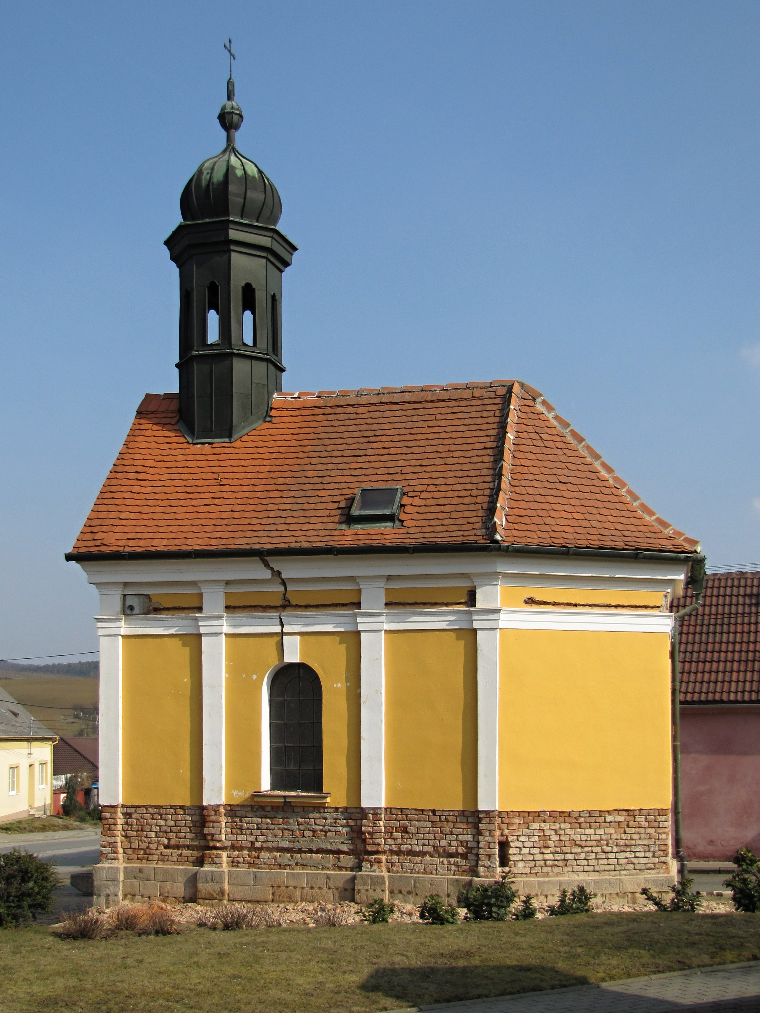 Kaple sv. Josefa ve Skalce